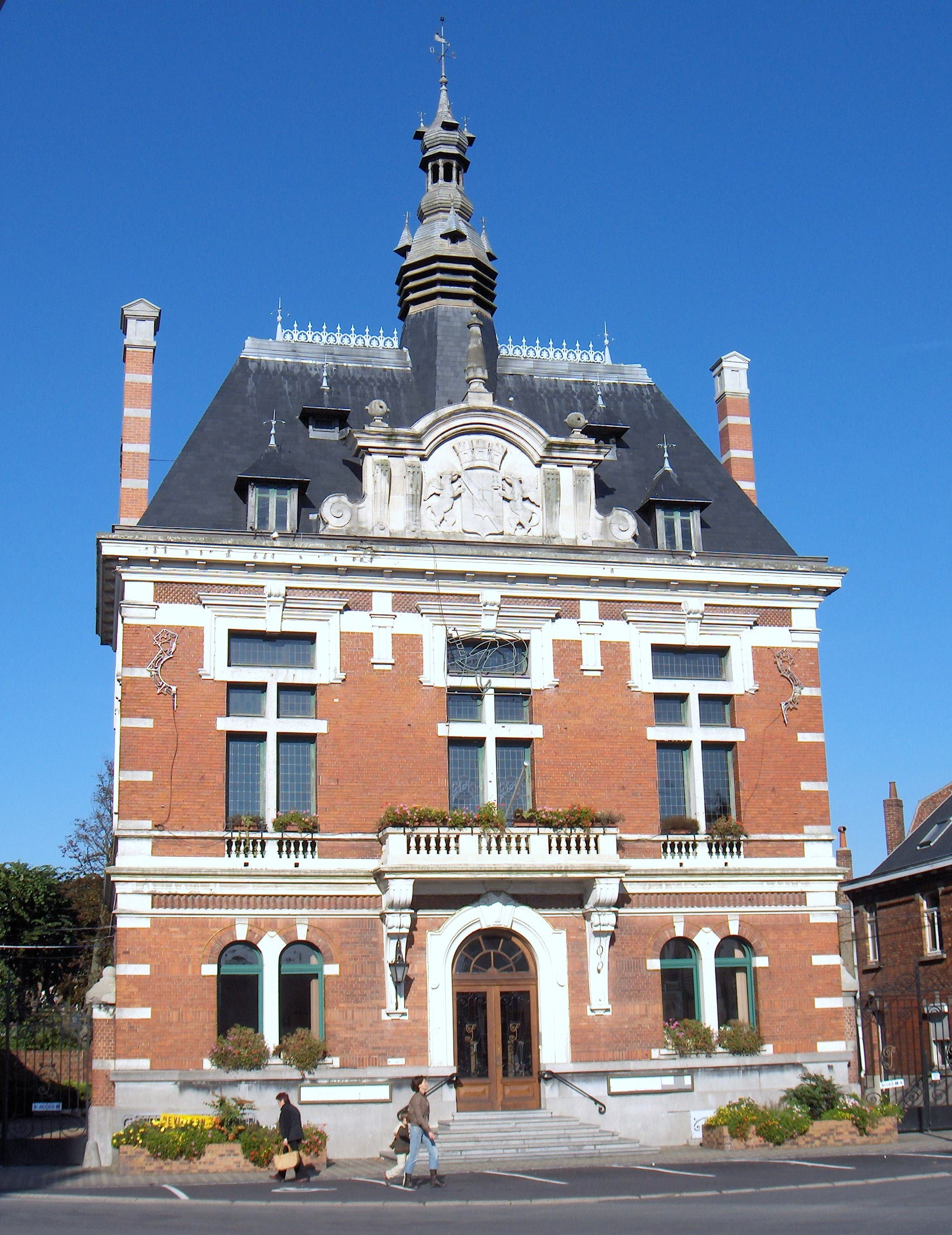 Pérenchies (France, dept. Nord), mairie